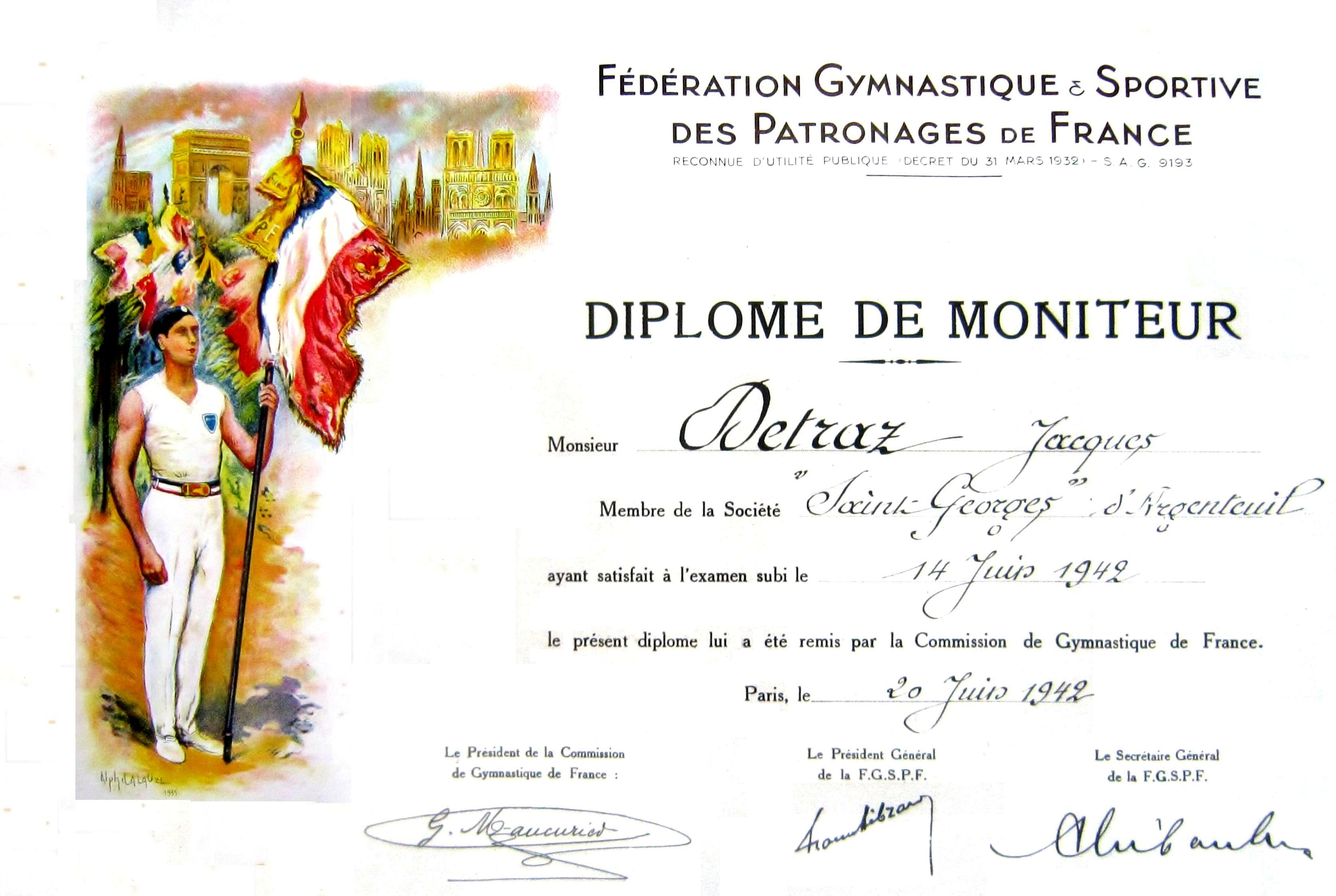 Diplôme de moniteur de gymnastique (1942)